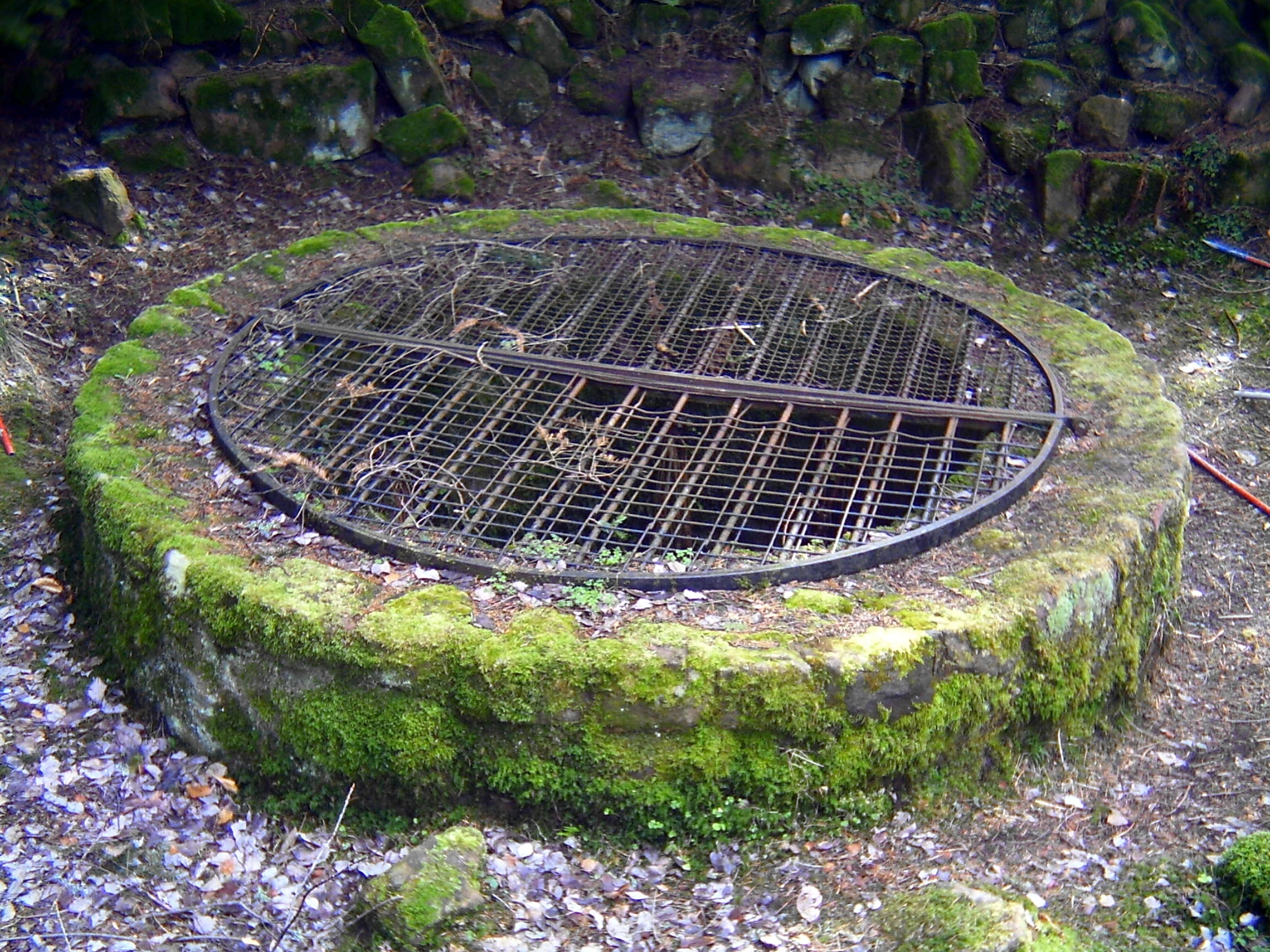 Der Tiefbrunnen der Willenburg (30m)